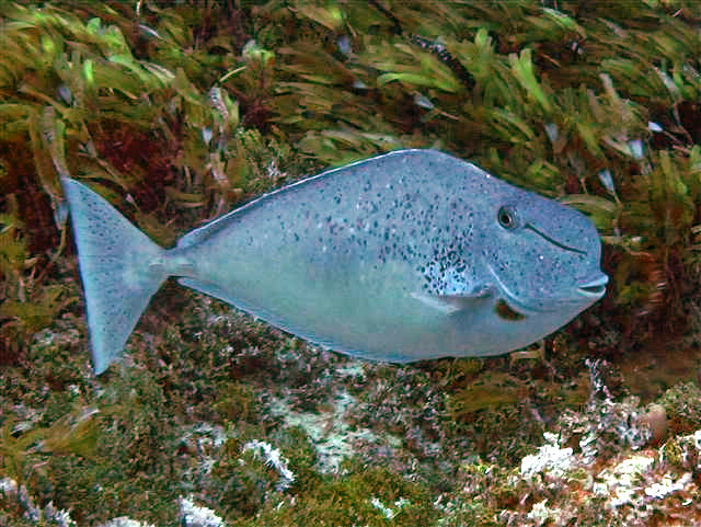 Naso tuberosus en Aldabra, Seychelles